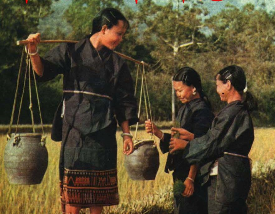 1962-05 1962年 海南岛乐东县 黎族民众